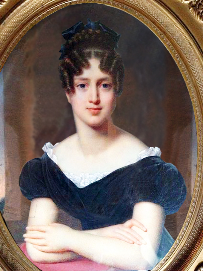 Laure de Comères au début du XIXème siècle- Coll. Particulière